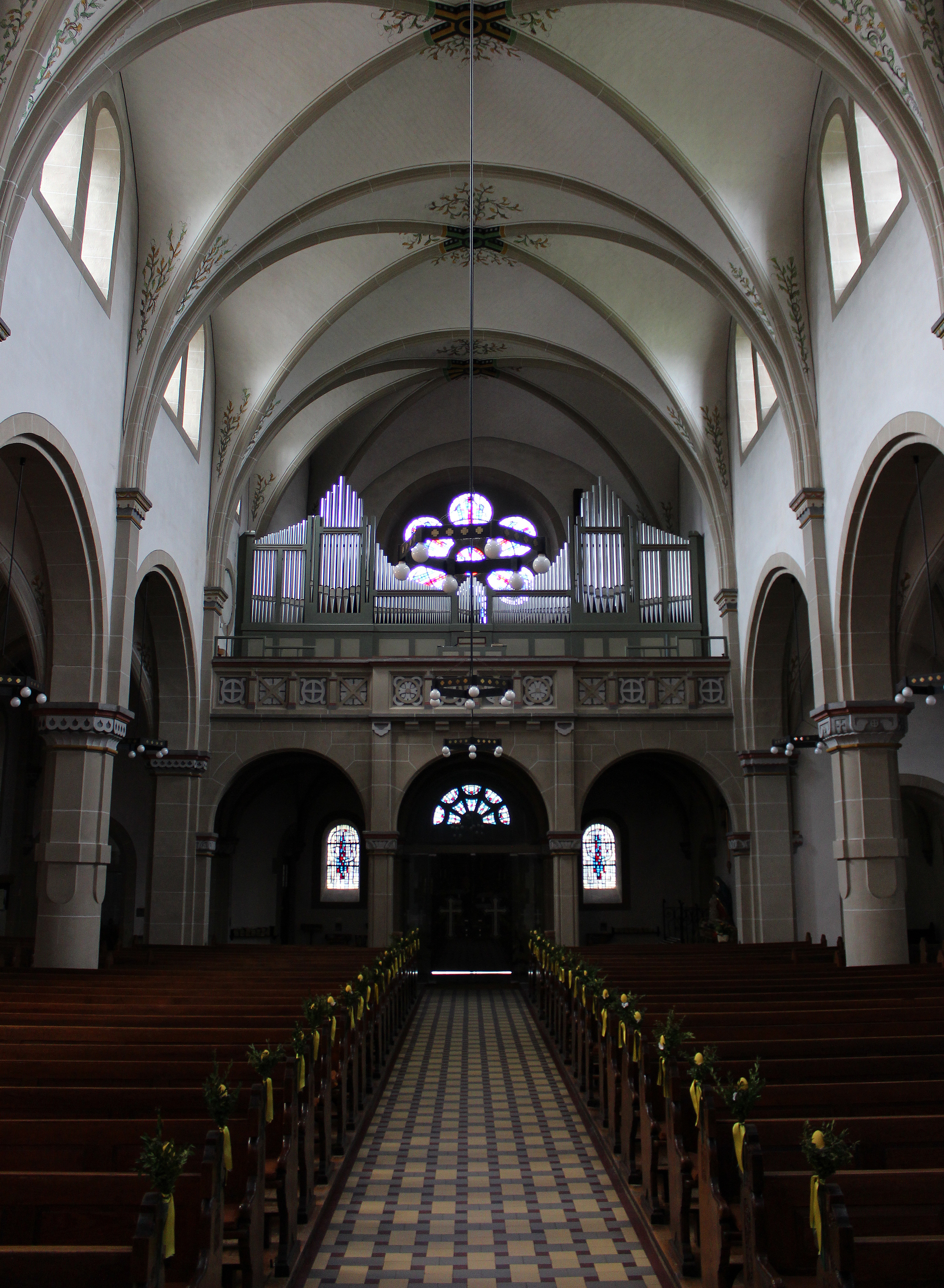 Blick ins Innere der katholischen Pfarrkirche St. Maria Magdalena in Hüttigweiler, einem Ortsteil der Gemeinde Illingen, Landkreis Neunkirchen, Saarland